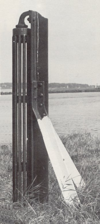 Eigen foto, beschikbaar GFDL